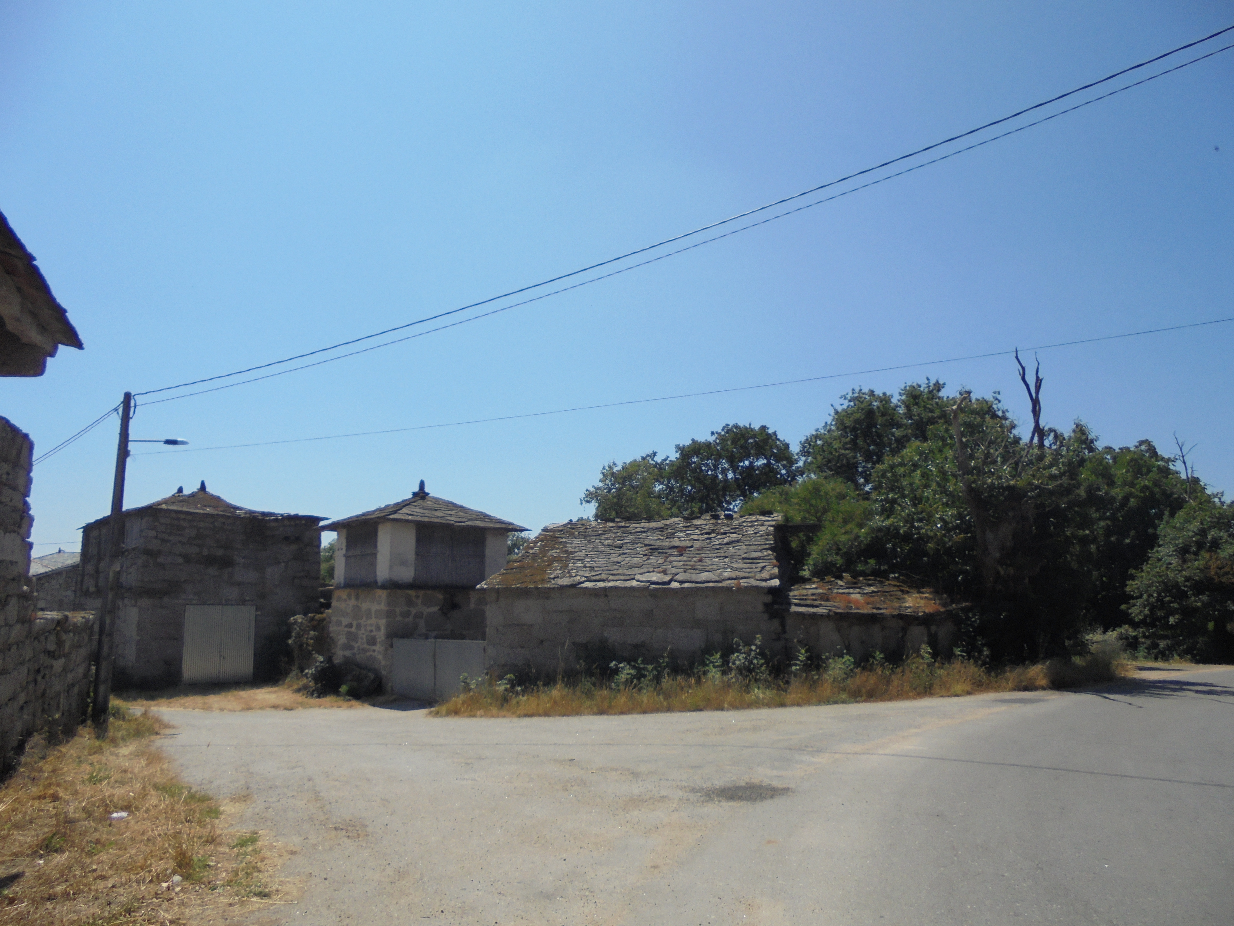 San Salvador de Muxa ( Lugo)